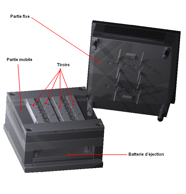 Moule d'injection ouvert avec annotations